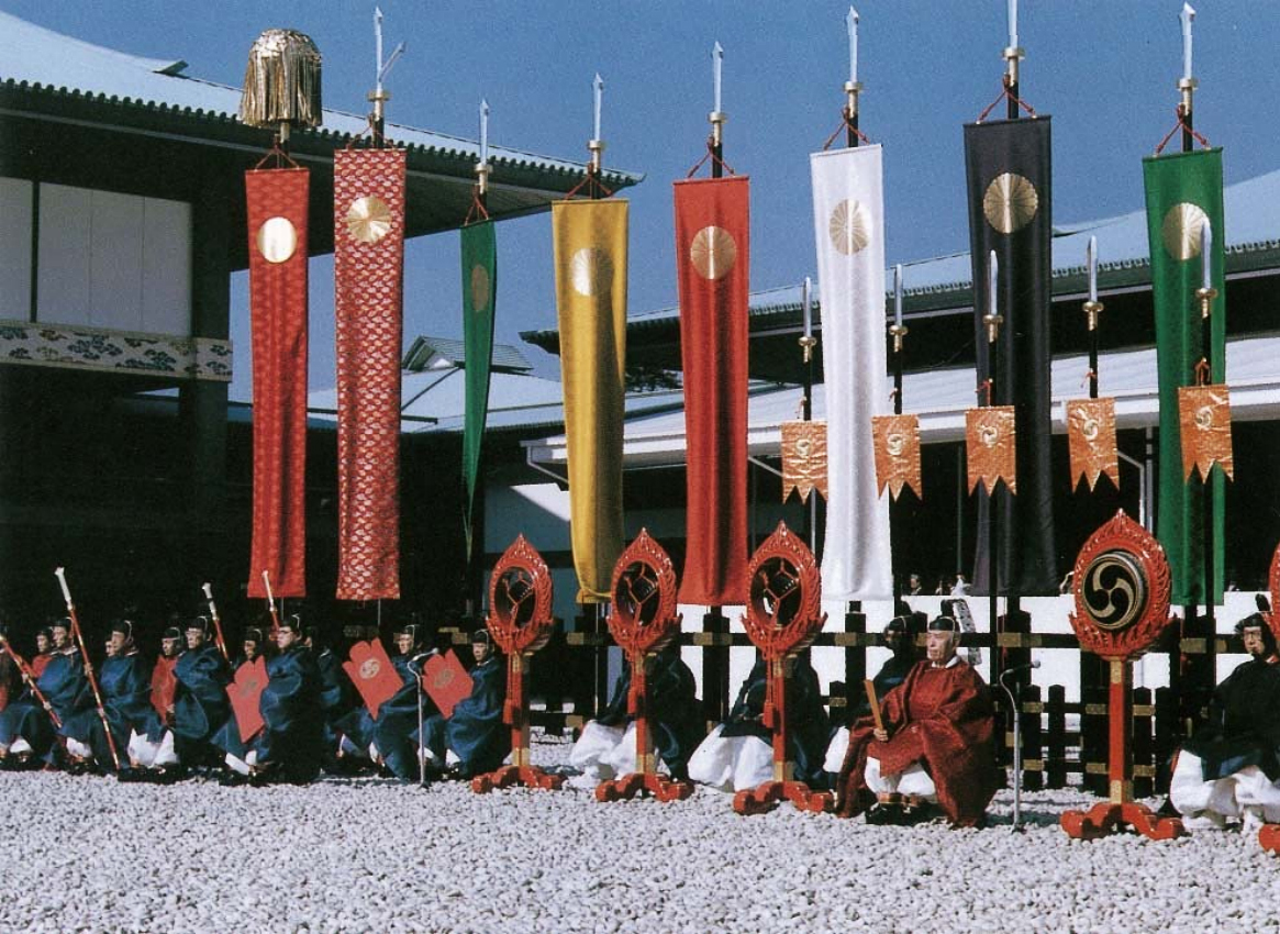 正殿正面軒下に帽額(もこう)が懸けられた。 宮殿中庭には、萬歳旛(ばんざいばん)をはじめとした色とりどりの旛(ばん)や、鉦(しょう)、鼓(こ)、桙(ほこ)が配置された。